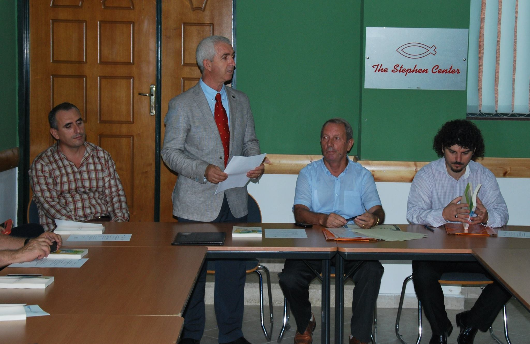 Perfundoi me sukses projekti i kërkuesve të rinj në fushën e sigurisë mjedisore në Shqiperi, realizuar nga Qendra " Hapesire" Tiranë, me mbështetjen e Qendrës rajonale të mjedisit ( në kuadër të programit , SENiOR-A ( Mbeshtetje për organizatat mjedisore të Shoqërisë Civile në Shqiperi) me financimin e Qeverisë Suedeze. Punimet e kërkuesve të rinj u botuan në një libër me titull " Paradigma e sigurisë mjedisore në Shqiperi". Në cilesine e kryetarit te bordit te Qendres "Hapesire" prezantova veprimtarine 6 vjeçare te kesaj organizate si dhe inkurajova kerkuesit e rinj nga universiteti "Aleksander Moisiu" Durres, Universiteti i Vlores, Universiteti i Shkodres, Universiteti " Marin Barleti" Akademia e Mbrojtjes,etj per vazhdimin e rruges se nisur dhe mbeshtjetjen tone te perhershme edhe ne botimin tone periodik , revisten shkencore " Marredhenie Nderkombetare" . Per kerkuesit e rinj u dhane çertifikata pjesemarrjeje.